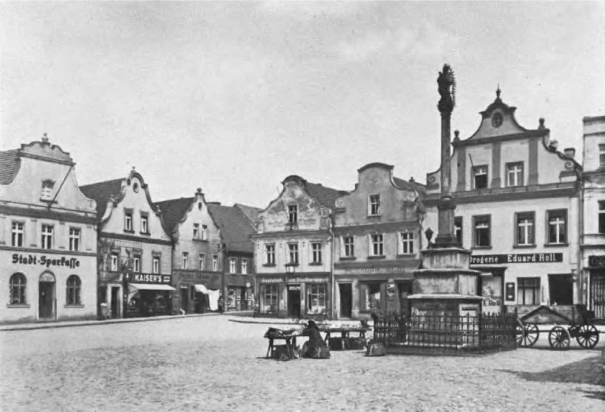 Rynek w Głogówku